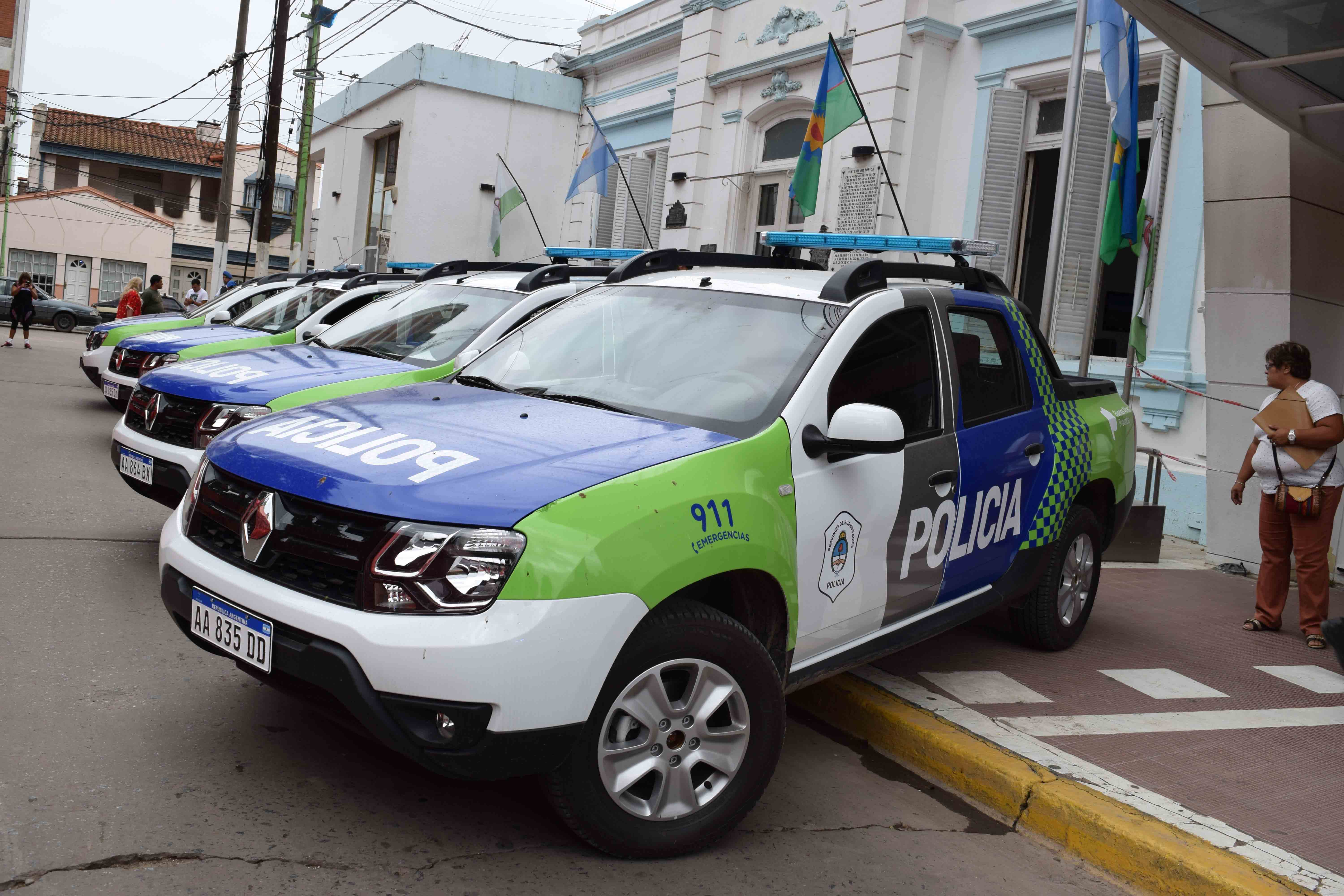 Nuevos patrulleros Renault Oroch de la policía de la provincia de Buenos Aires